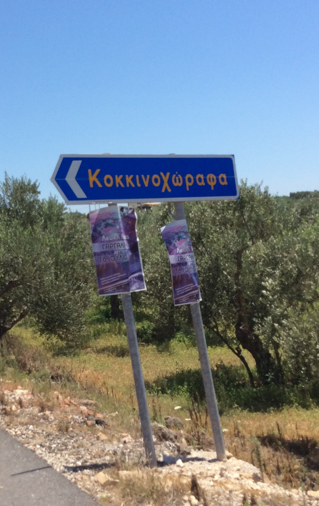 Νότια είσοδος προς τον οικισμό.